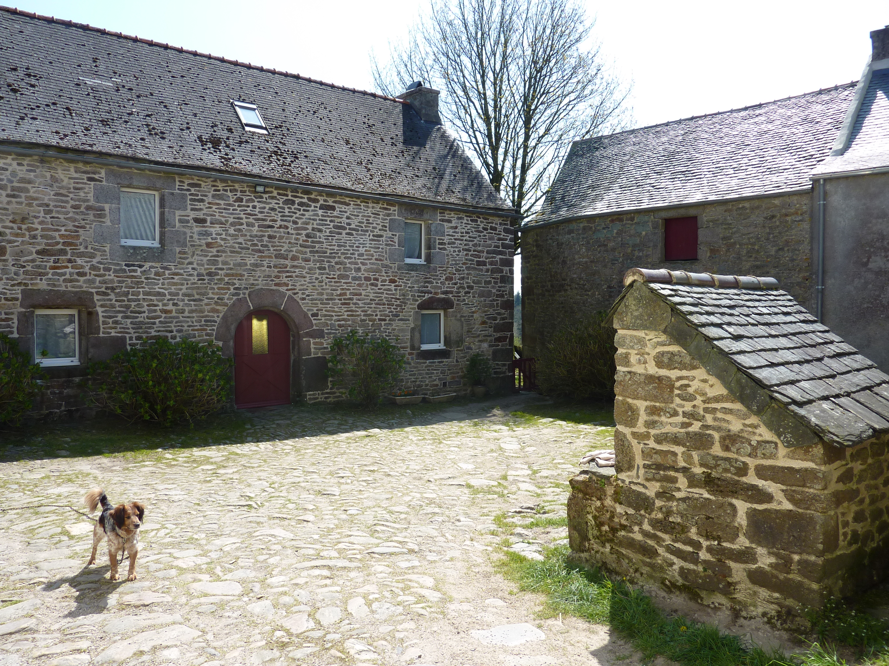 La Feuillée. La cour de l'ancienne commanderie de Pors Cloz